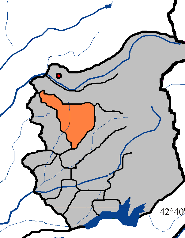 Сельская администрация Первая Бедиа (Ткуарчалский район)